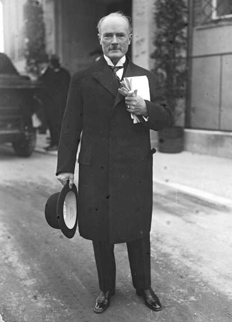 Dr. Krupp von Bohlen und Halbach, der neue Industrie-Präsident des Reichsverbandes der Deutschen Industrie! Dr. Krupp von Bohlen und Halbach, welcher zum Nachfolger des von seinem Posten zurückgetretenen bisherigen Präsidenten Geheimrat Duisberg ernannt wurde.